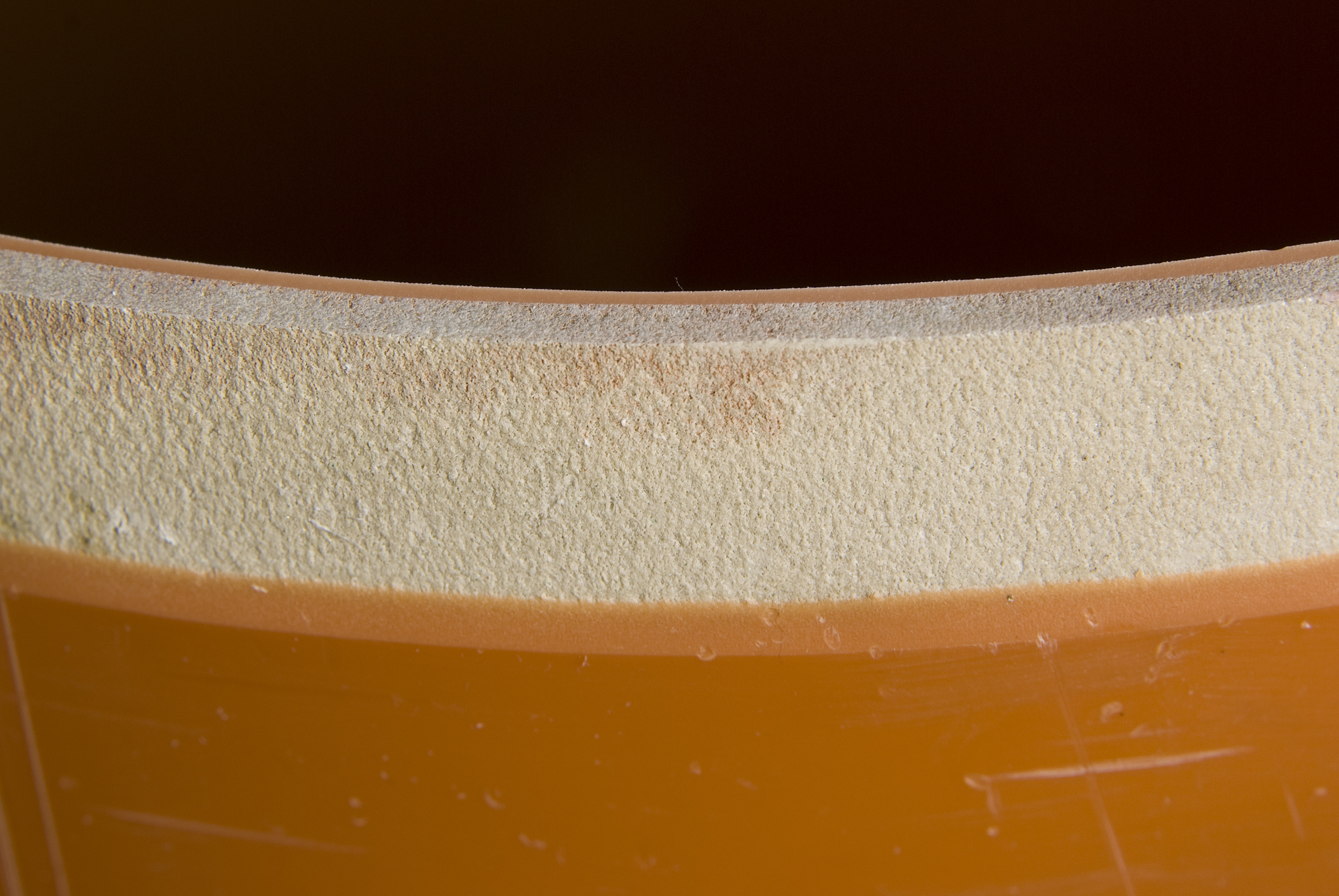 Ein kerngeschäumtes KG Rohr, DN 300mm. Gut erkennbar ist der Aufbau des PVC Rohres. Oben = Innenseite